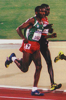 Mens 10000m sydney 2000 olympics